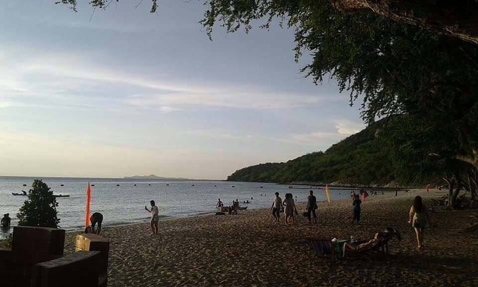 Sai Kaew Beach, spiaggia militare situata vicino Pattaya accessibile solo con taxi o songtaew